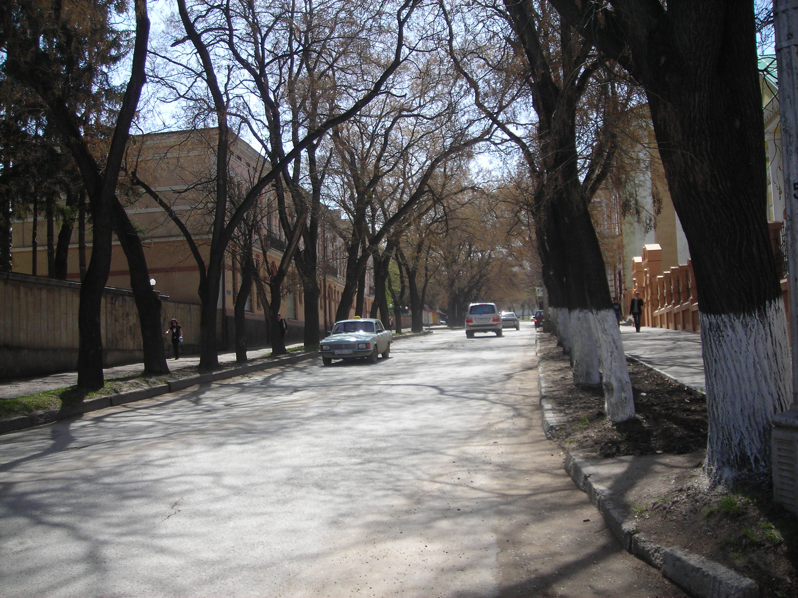 Prospekt Mira in Kislovodsk